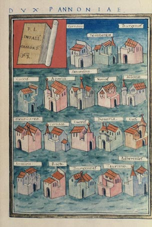 Dux Pannoniae secundae from Notitia dignitatum